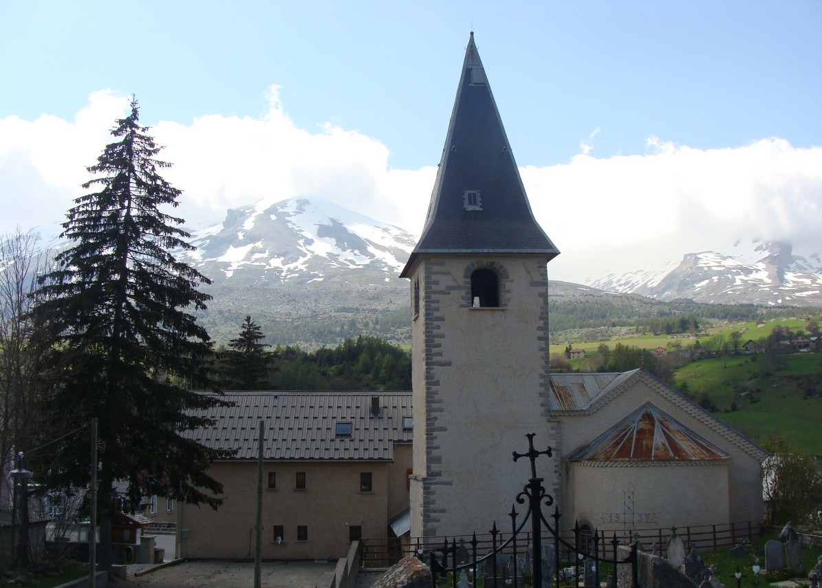 Agnières-en-Dévoluy: l'église vue de l'extérieur. On voit le clocher accolé à l'église, et l'abside romane couverte de tôle.